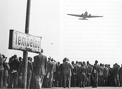 Berliner Luftbruecke